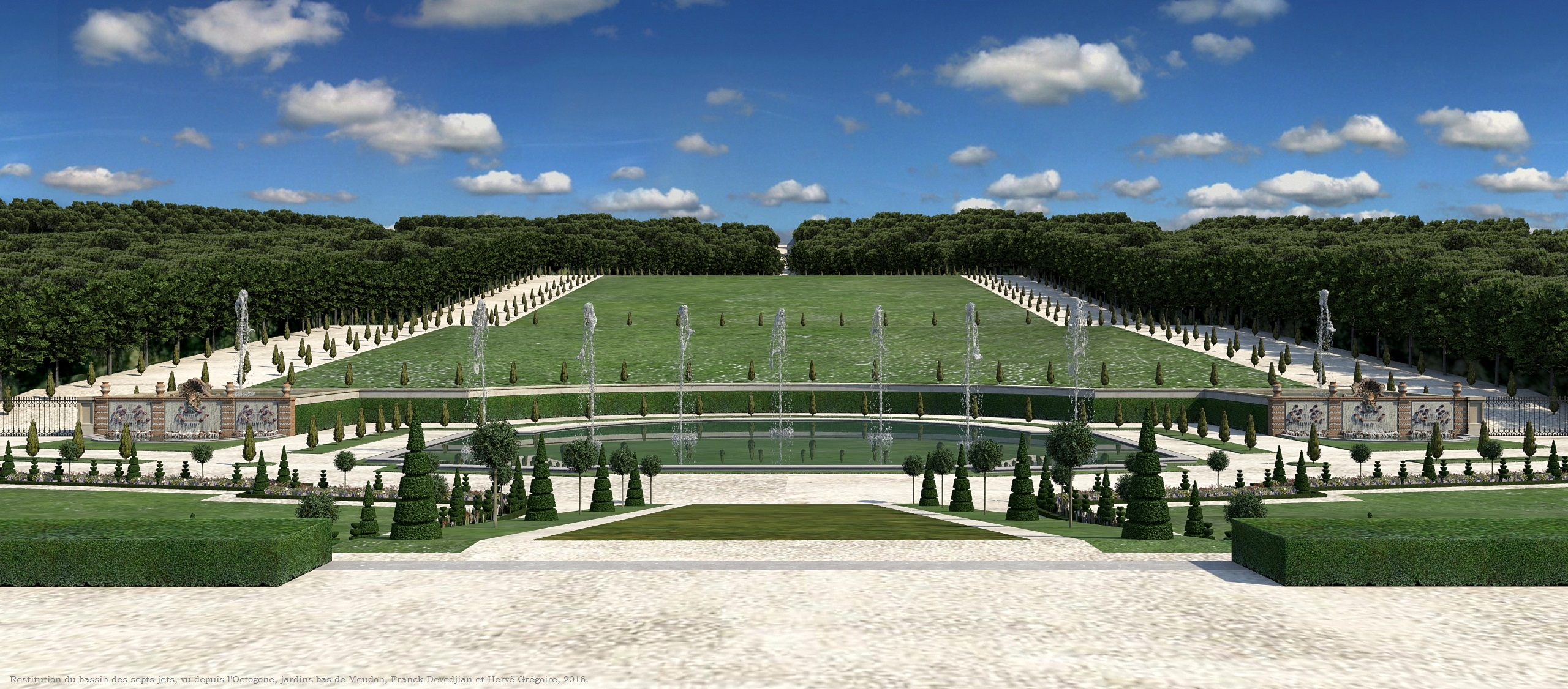 Restitution du point de vue sur le bassin des sept jets depuis l'Octogone, jardins bas de Meudon. Image 3D de Franck Devedjian et Hervé Grégoire, 2016.